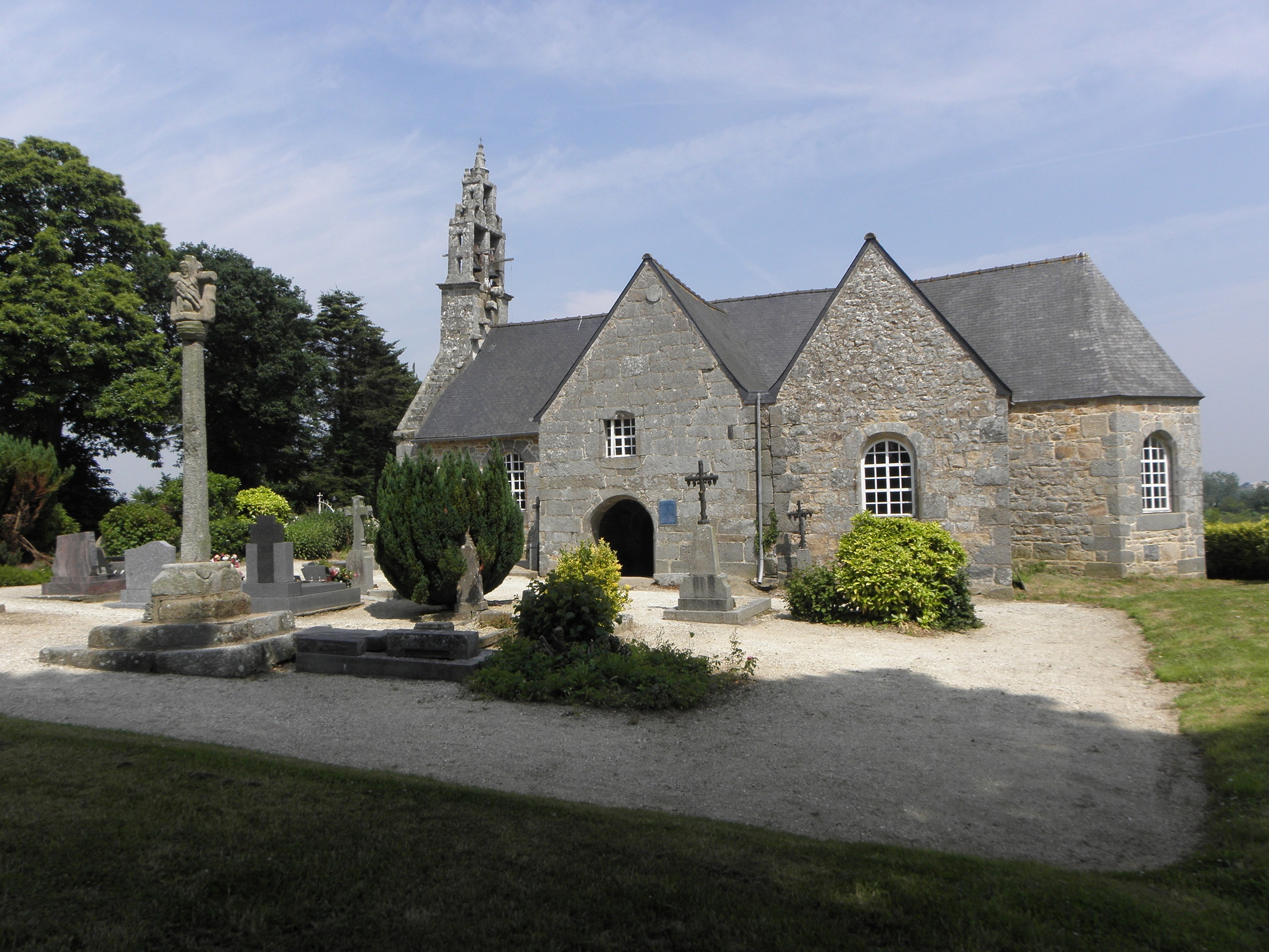 Église Saint-Ézéchiel de Lanvézéac sise commune de Caouënnec-Lanvézéac (22). Flanc sud et calvaire.